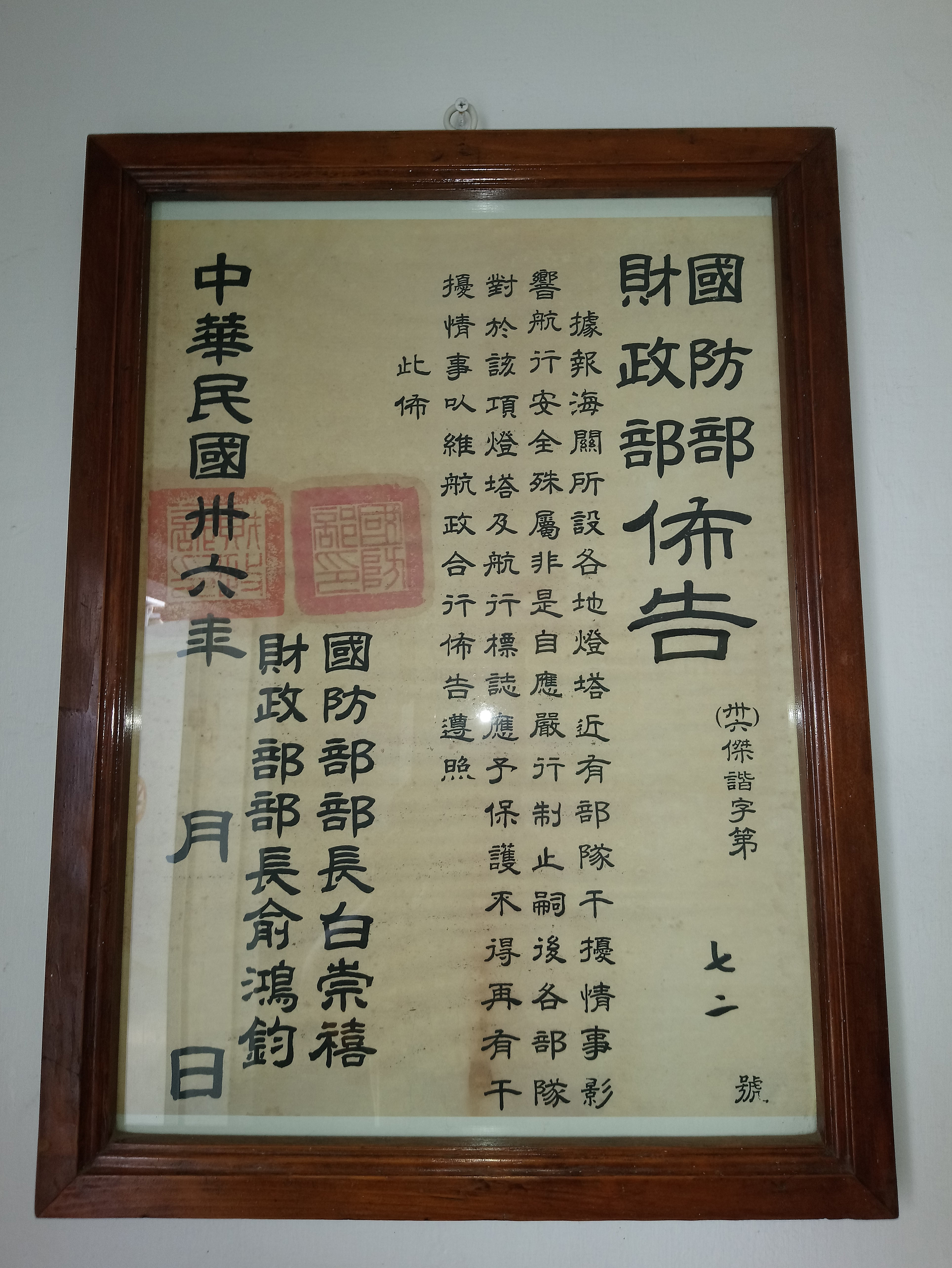 1947年國防部財政部布告(傑諧字第七十二號),桃園市觀音區觀音地區觀音里